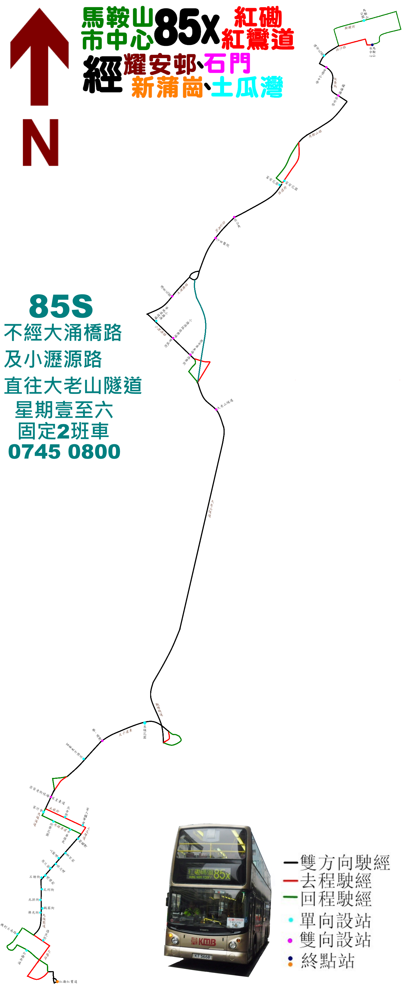 中文（香港）: 九巴85X線的走線圖